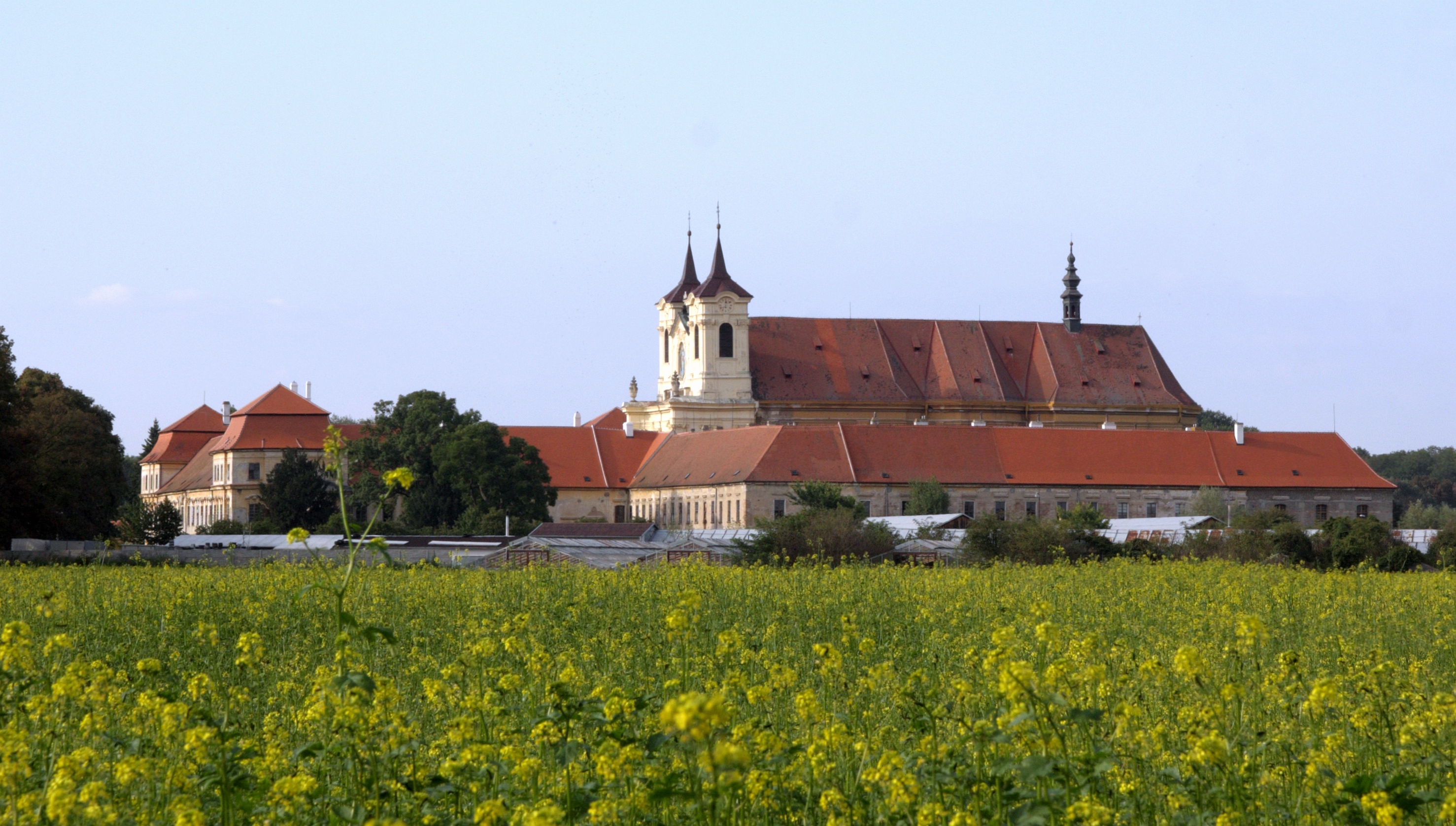 Rajhrad - benediktinský klášter, pohled od jihu.